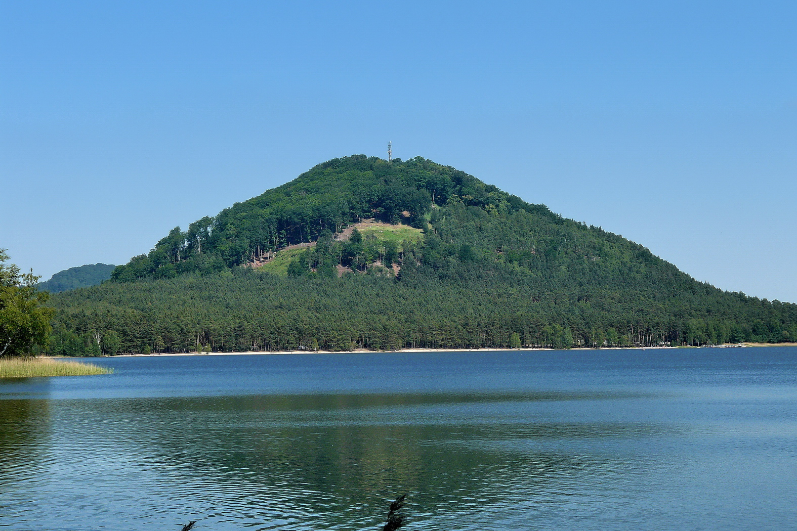 Borný nad Máchovým jezerem